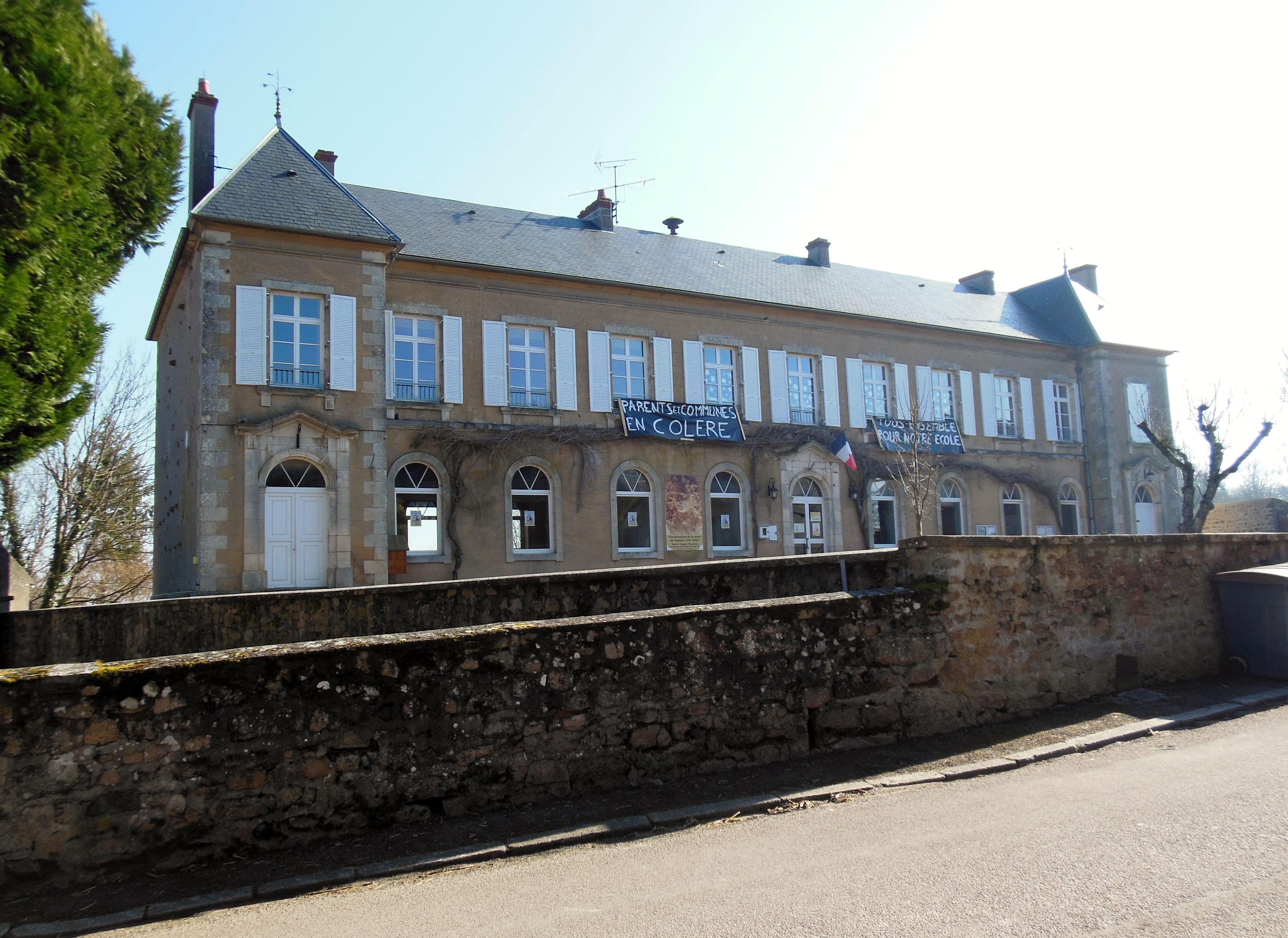 Mairie-école de Saint-Léger-Vauban, Yonne.